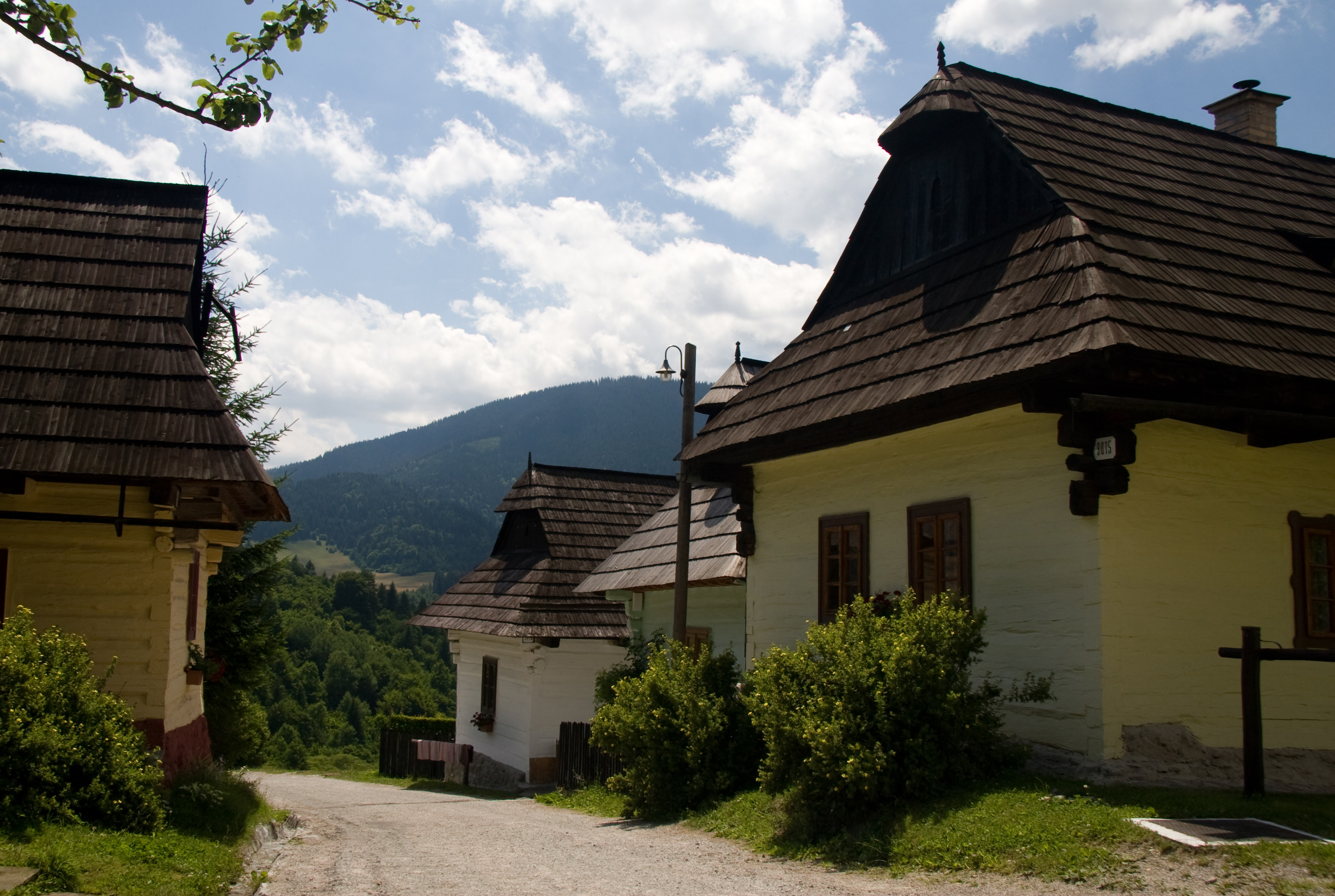 Vlkolínec